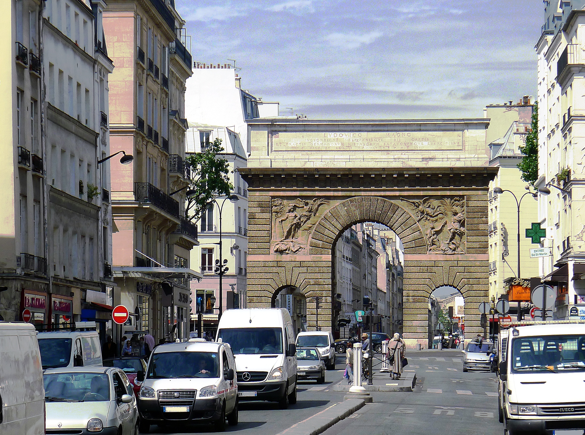 Rue Saint-Martin à son extrémité nord, au niveau de la porte Saint-Martin qui se trouve dans le Xe - Paris III